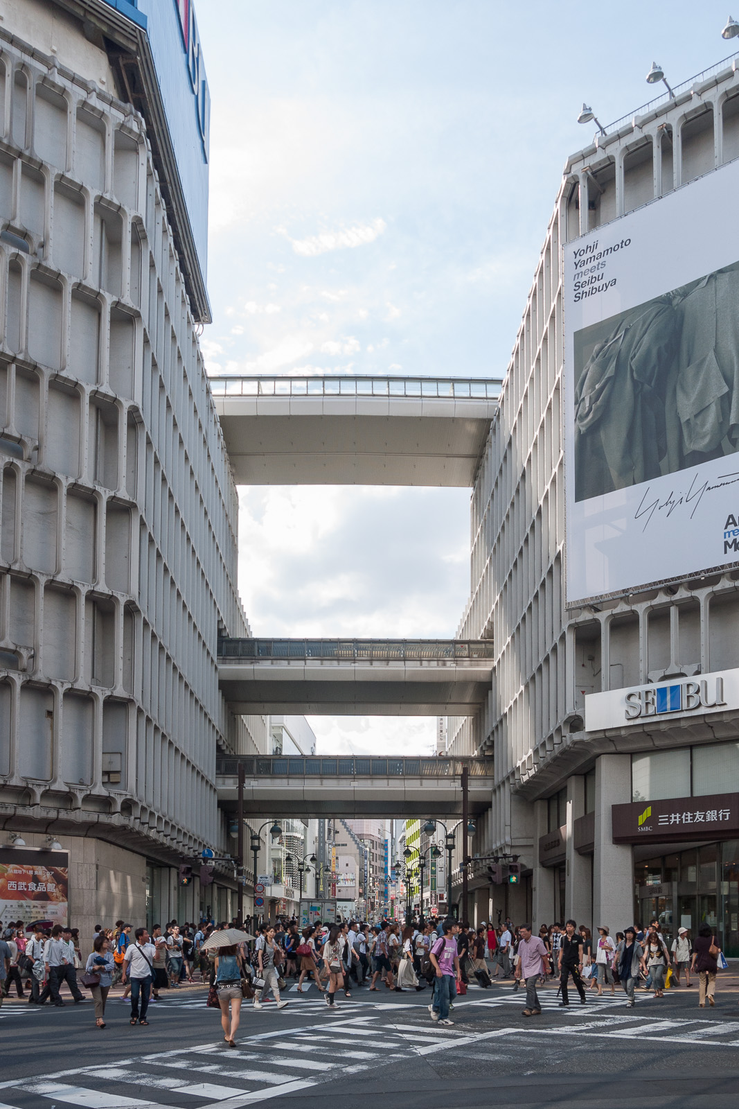 西武百貨店渋谷店。